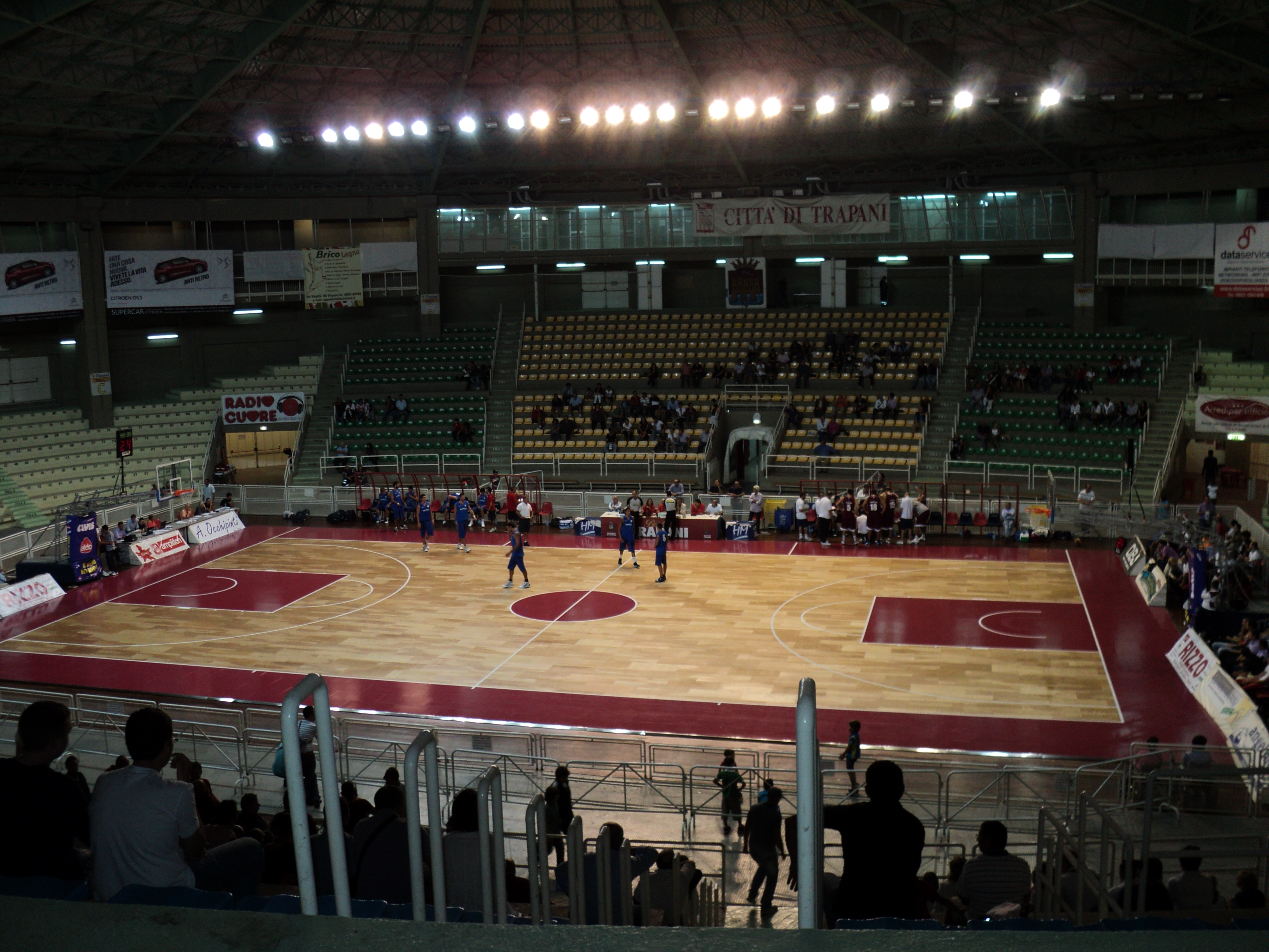 PalaIlio - Palasport Comunale di Trapani